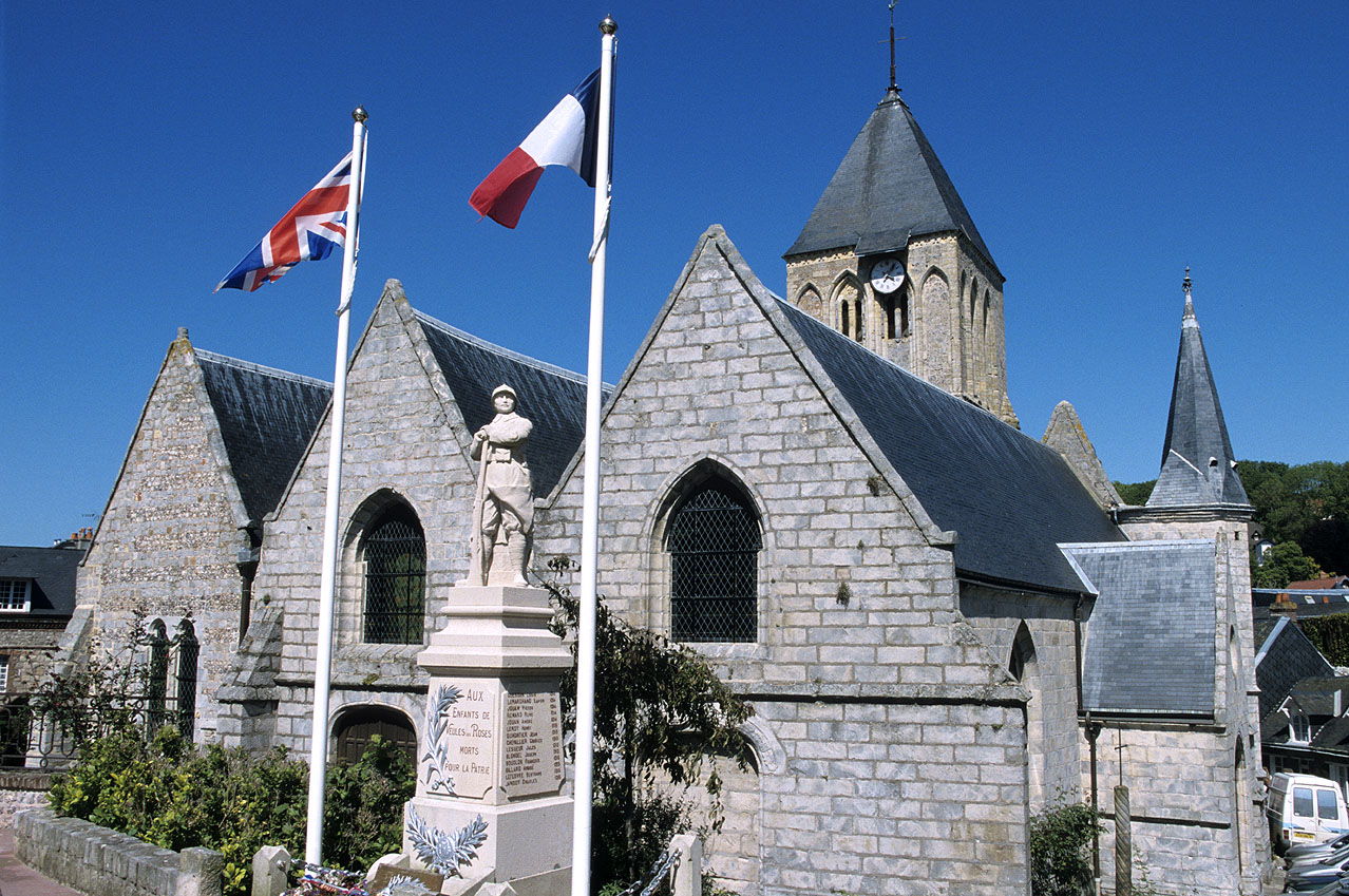 Église Saint-Martin de Veules-les-Roses et le monument aux morts de la guerre 1914-1918.)